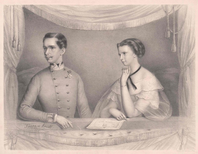 Kaiserpaar Franz Joseph und Elisabeth in einer Loge, 1855; Österreichische Nationalbibliothek